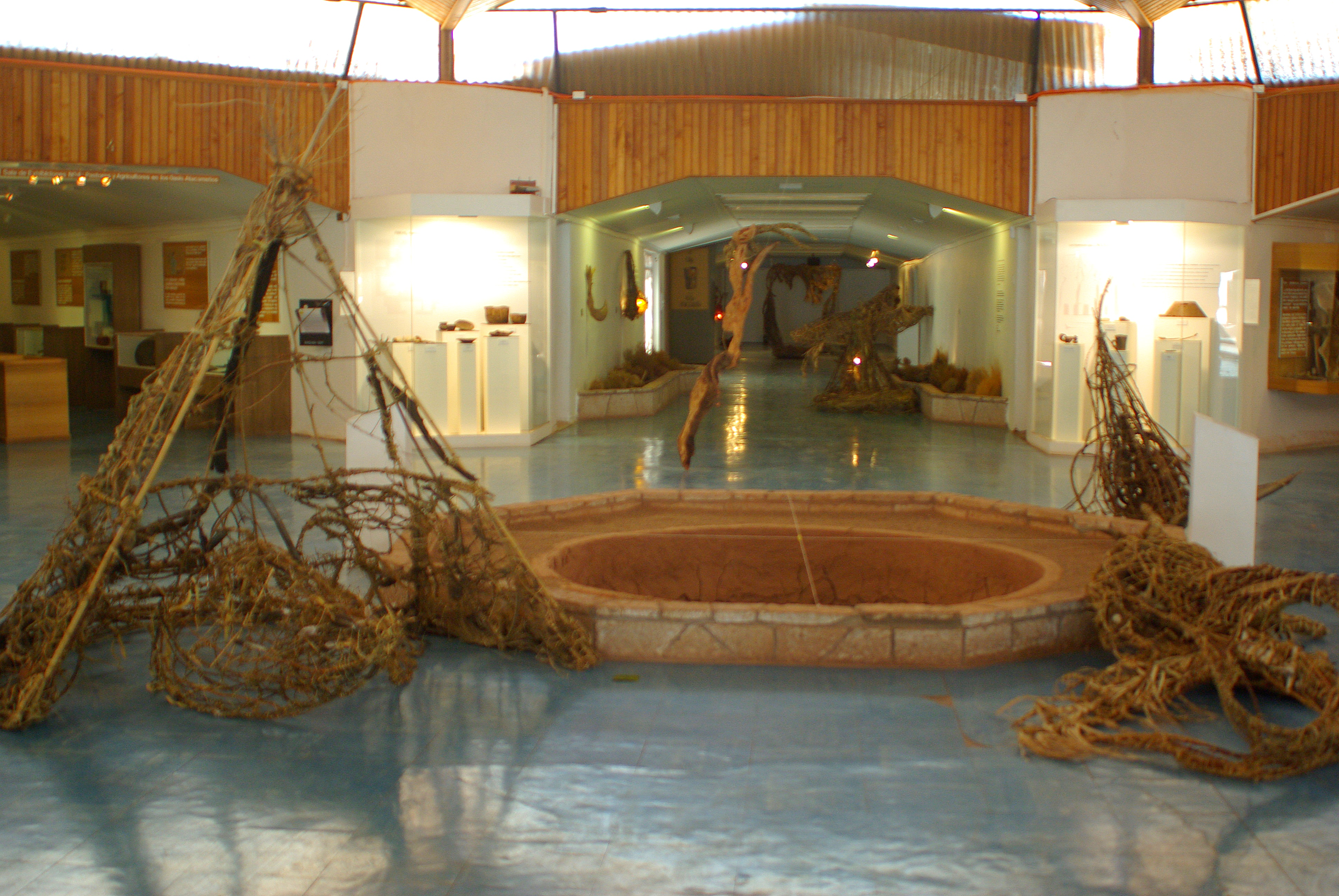 Sala de ingreso del Museo Arqueológico de San Pedro de Atacama, abril de 2010